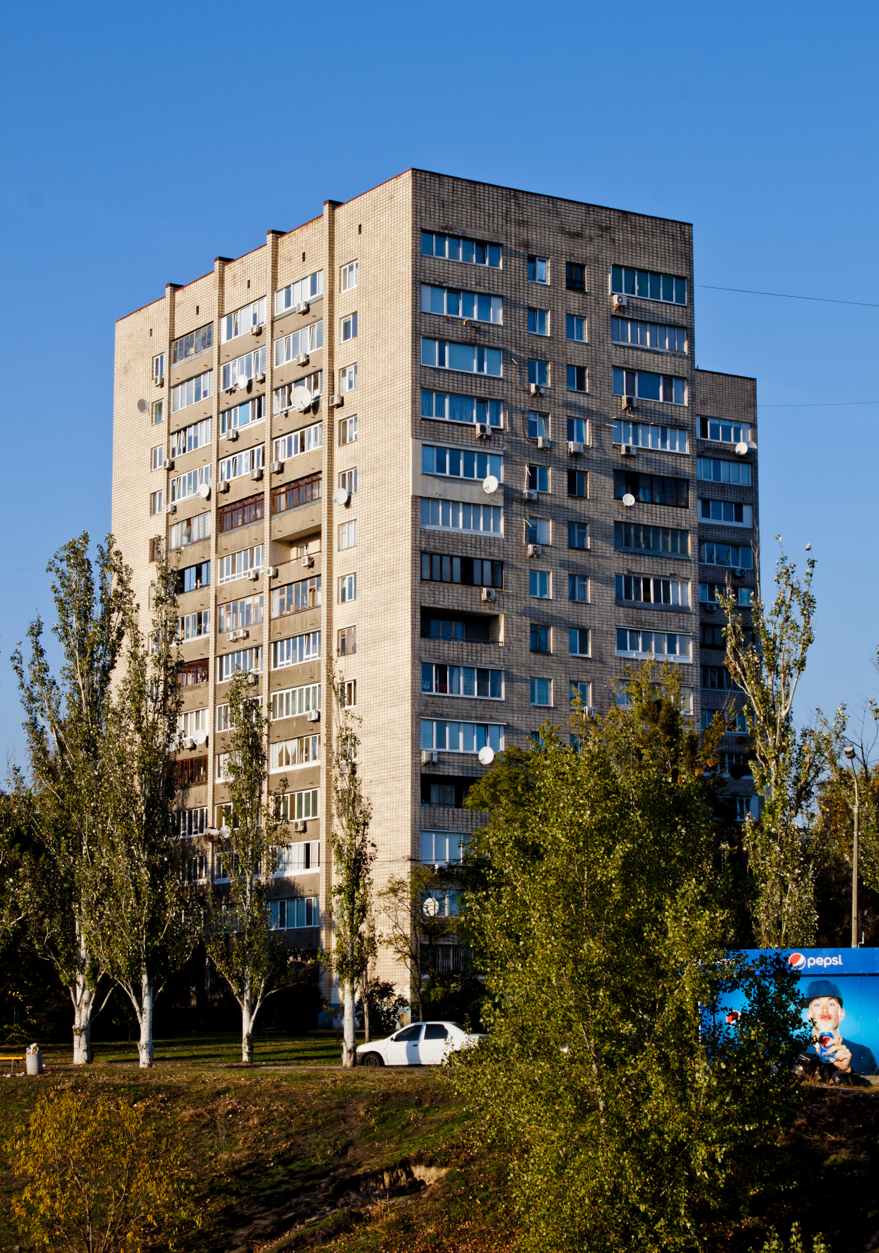 Будинок, в якому у 1975—1979 рр. мешкав Биков Л. Ф., актор і режисер, Київ, Туманяна Ованеса вул., 8